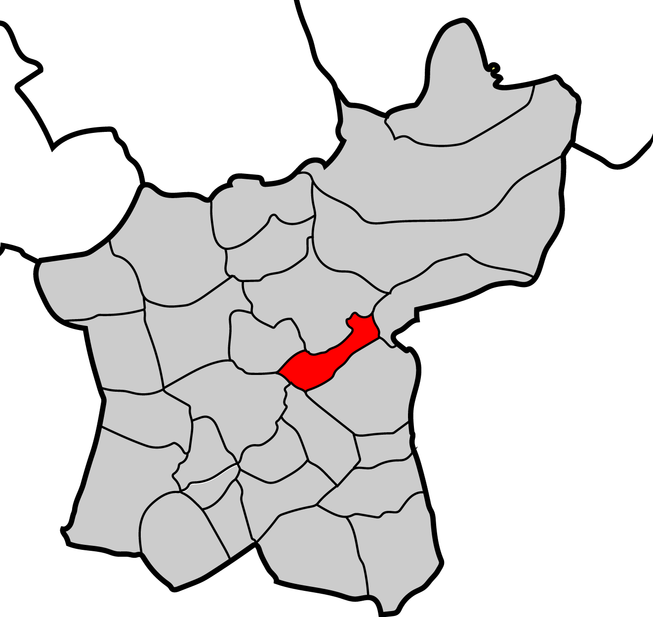 Mapa parroquia de Baralla